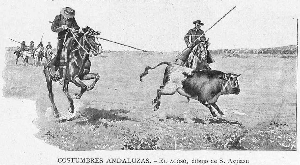 Costumbres andaluzas. Acoso, derribo y tienta.